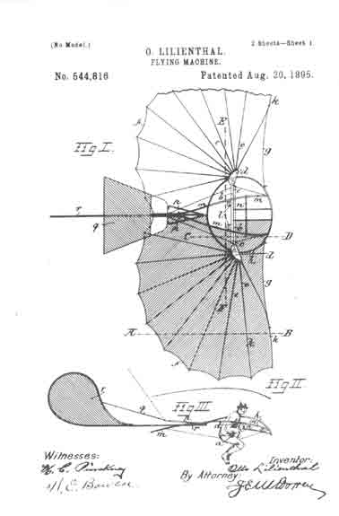 US-Patentschrift Nr. 544,816